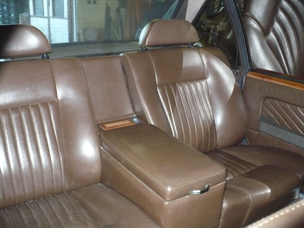 Interiér